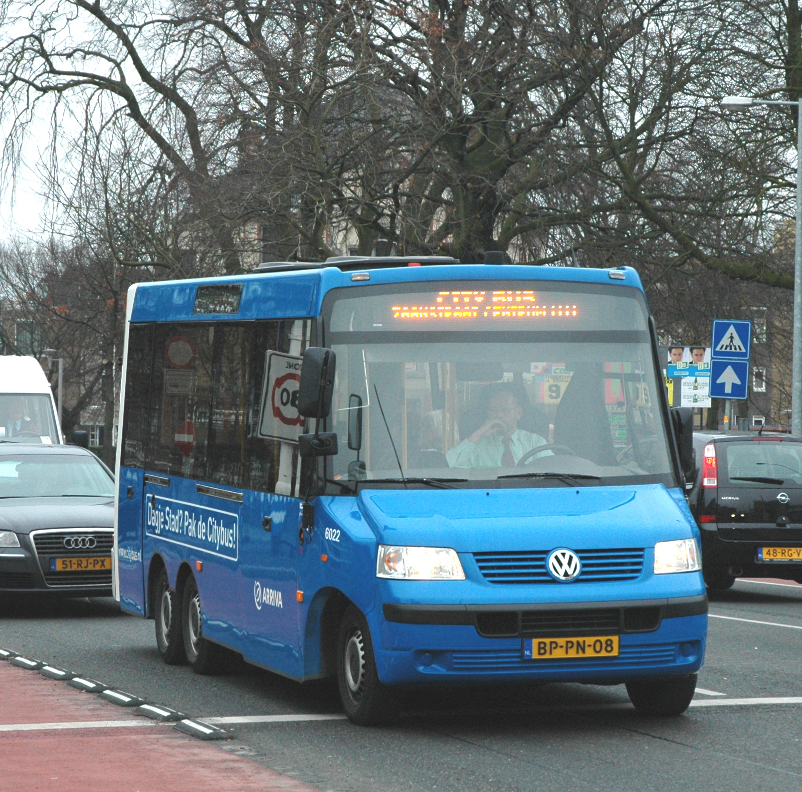 Arriva bus 6022 van het Kutsenits type City IV op 31 januari 2006 te Groningen